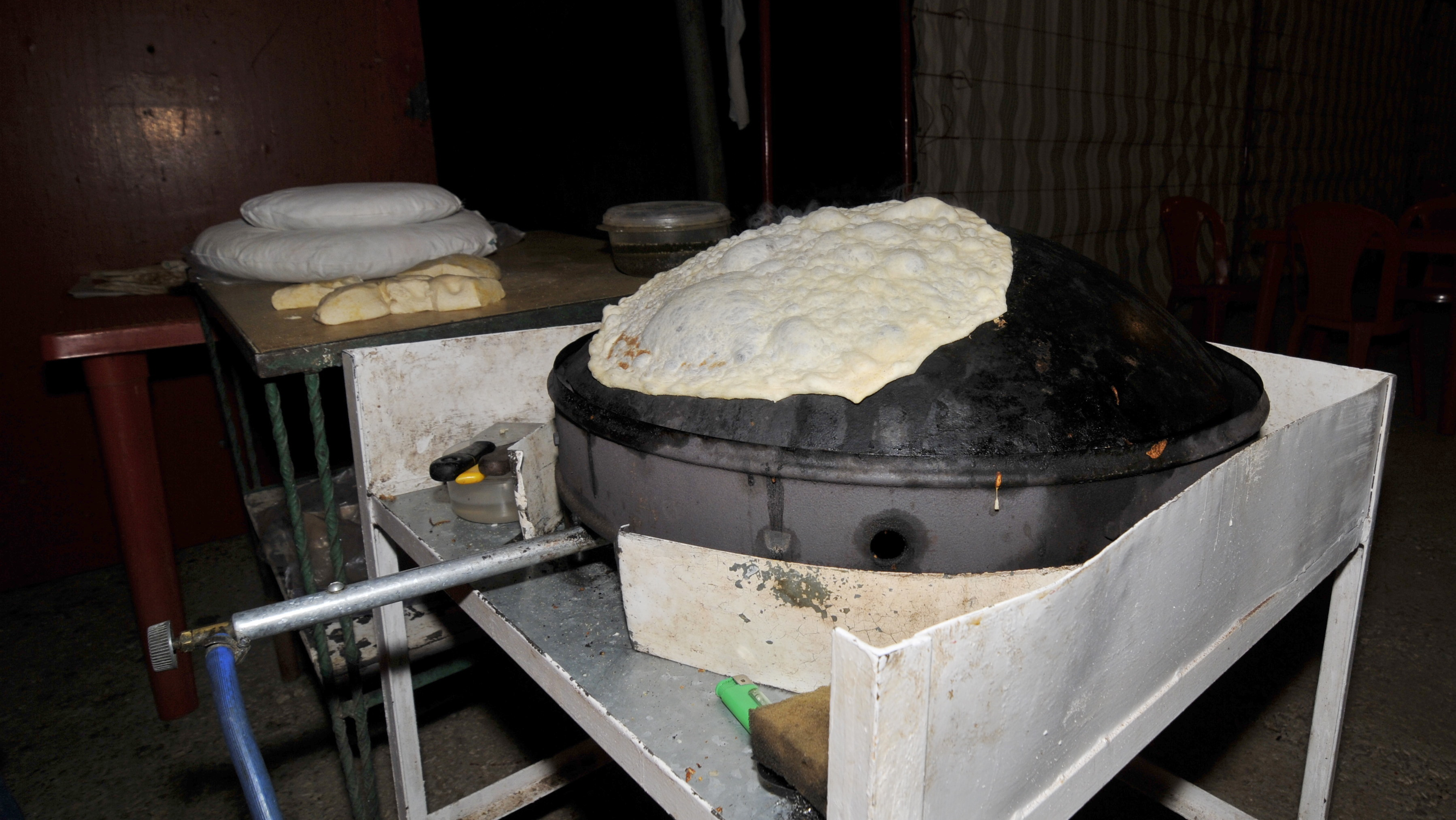 Markook bread cook